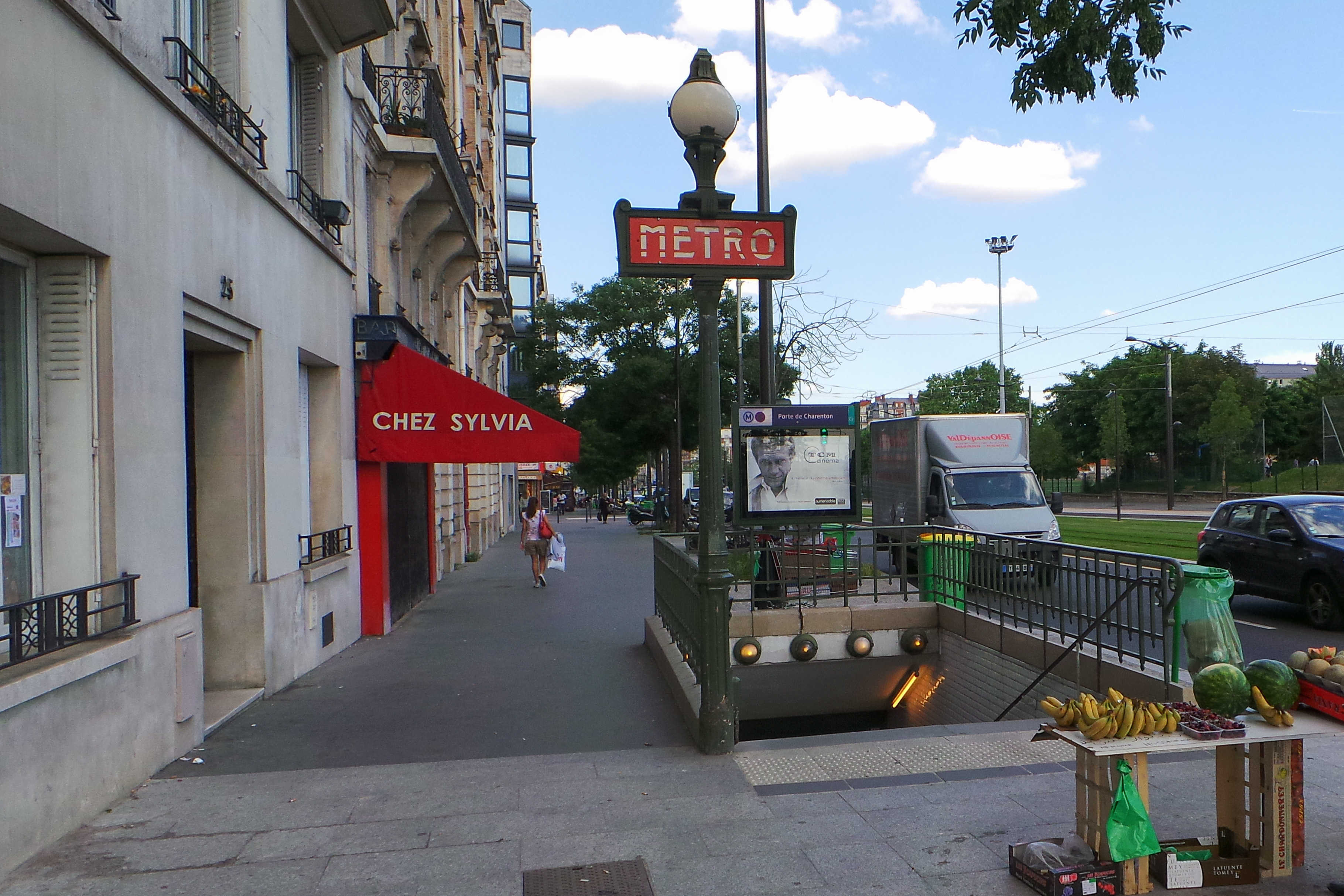 Station de métro Porte de Charenton, ligne 8 du métro de Paris - Paris, France